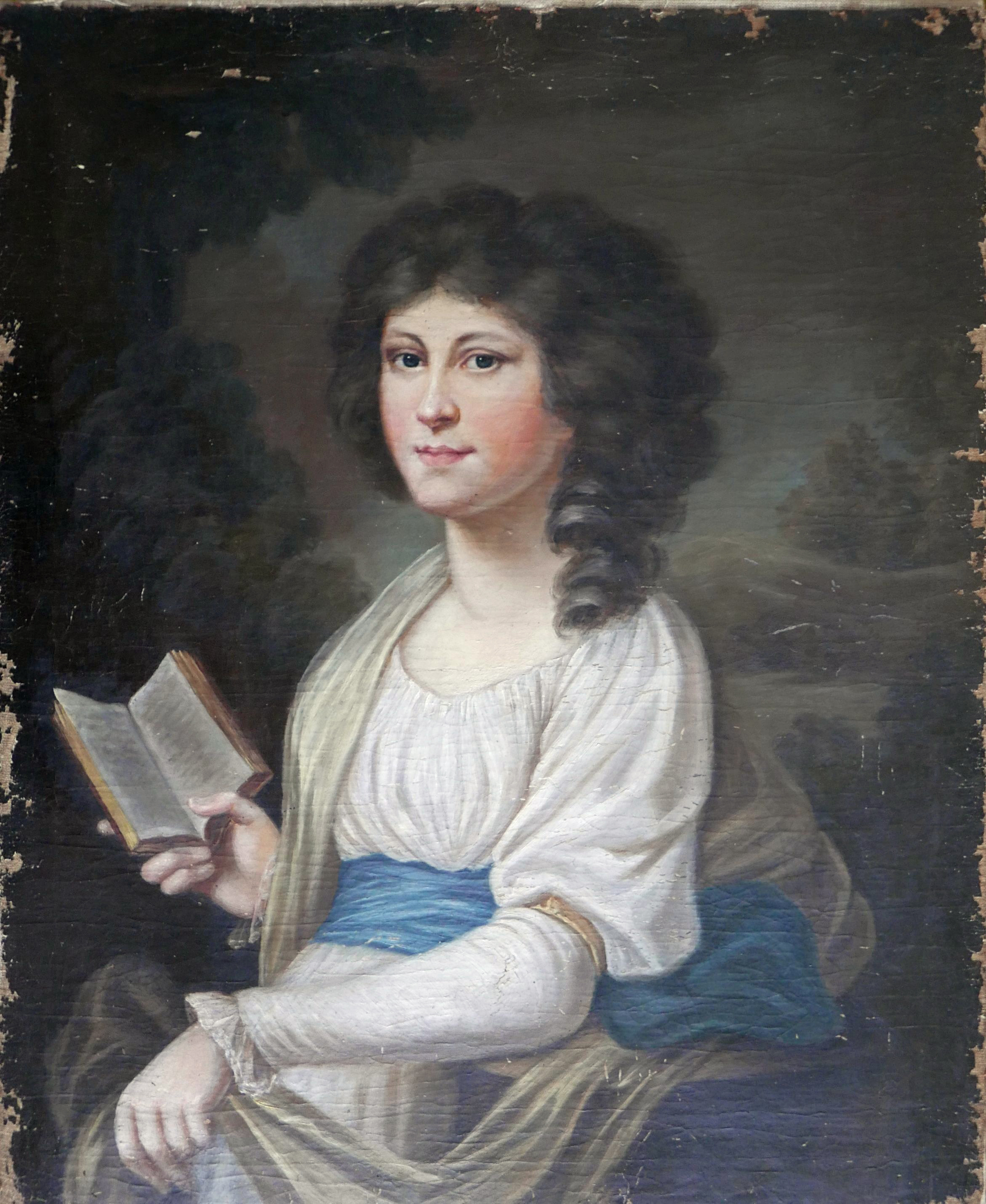 Беларуская (тарашкевіца): Партрэт Барбары Касакоўскай (Eleanora Kasakoŭskaja) з роду Зыбэркаў (Zyberk)